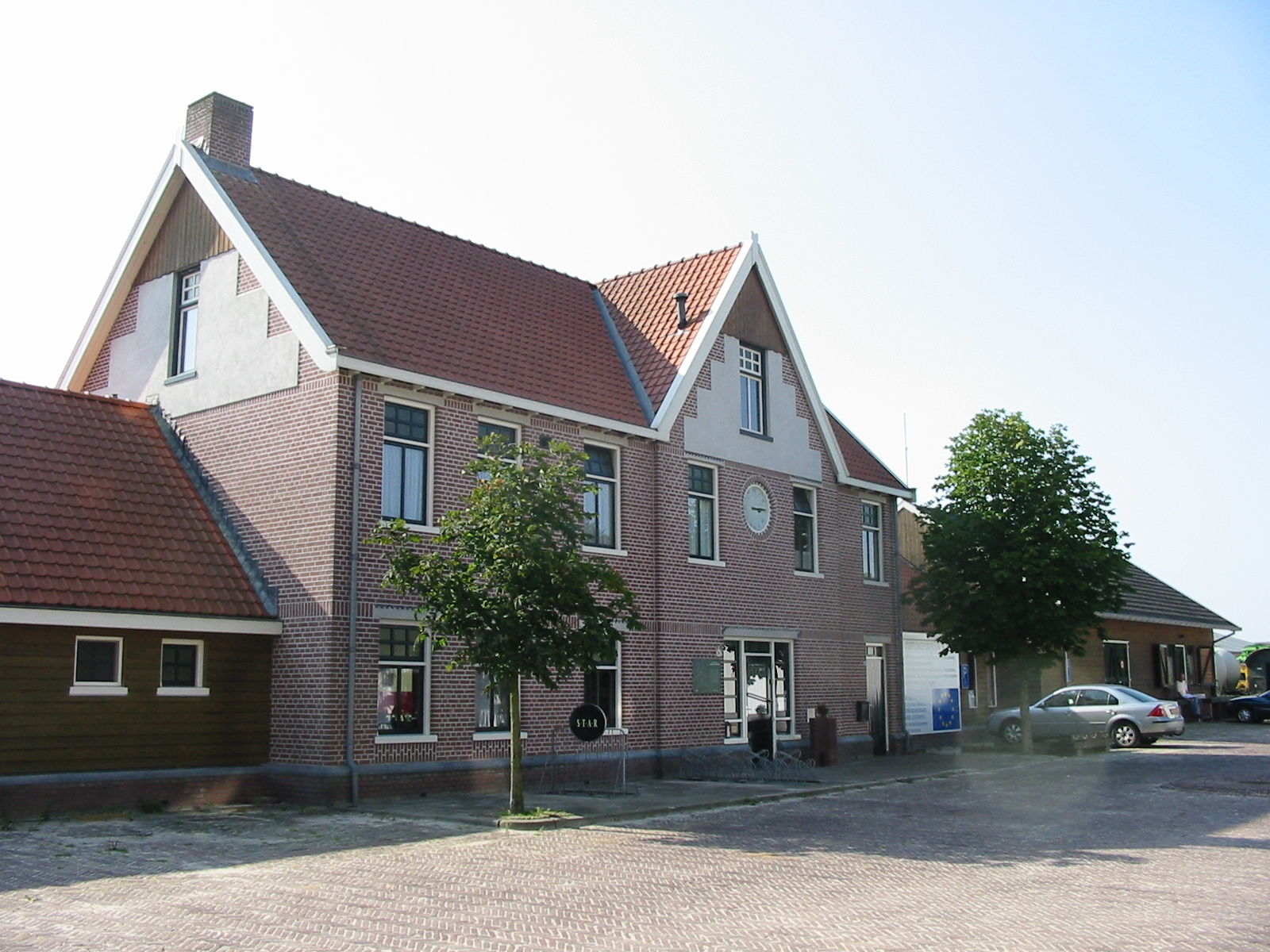 voorzijde STAR-station Stadskanaal